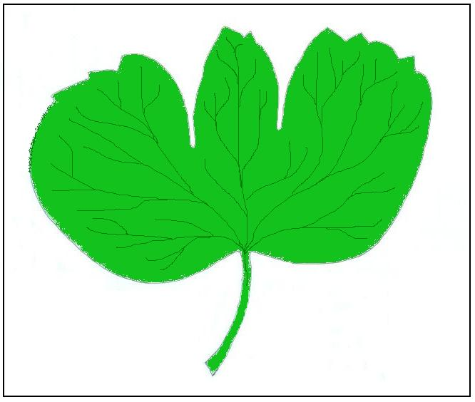 Ranunculus hybridus - Foglia